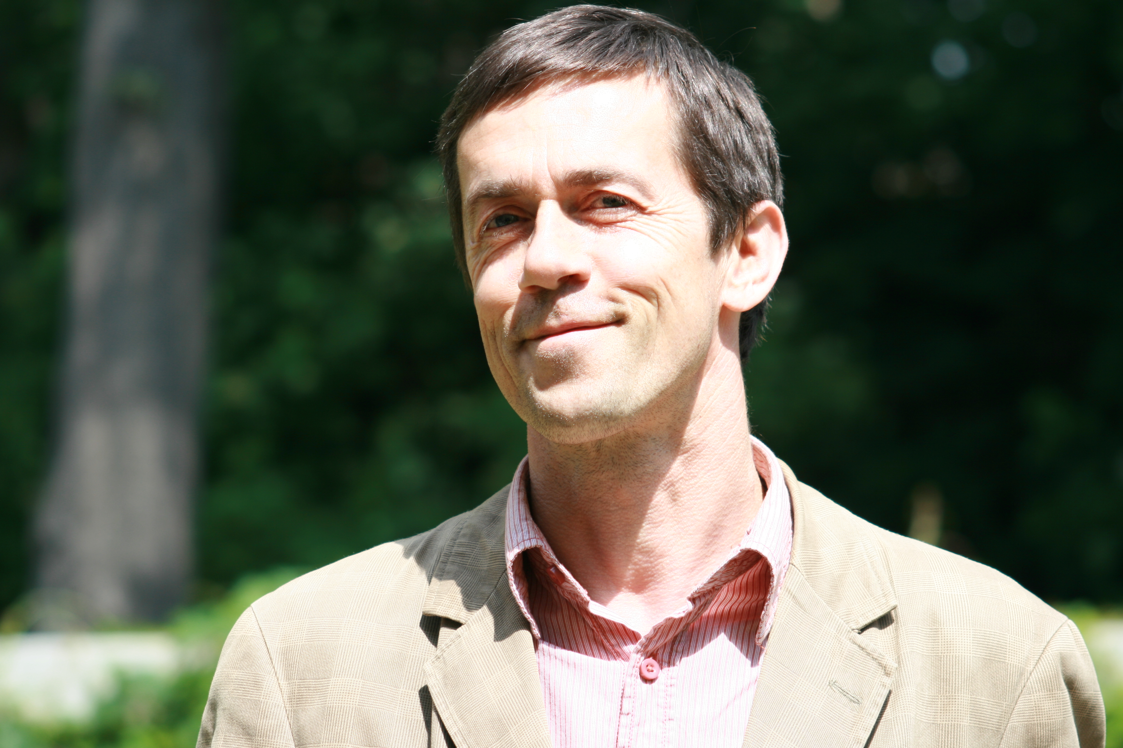 Maik Hosang 2014